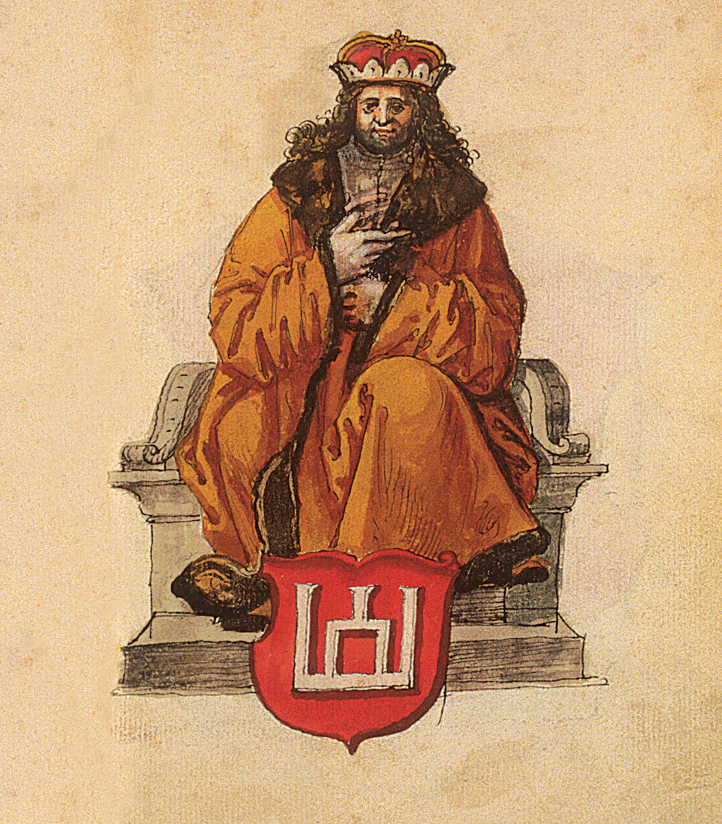 Беларуская (тарашкевіца): Партрэт Вітаўта Вялікага (Vitaŭt Vialiki) на вялікакняскім стальцы з гербам Калюмны (Kalumny)